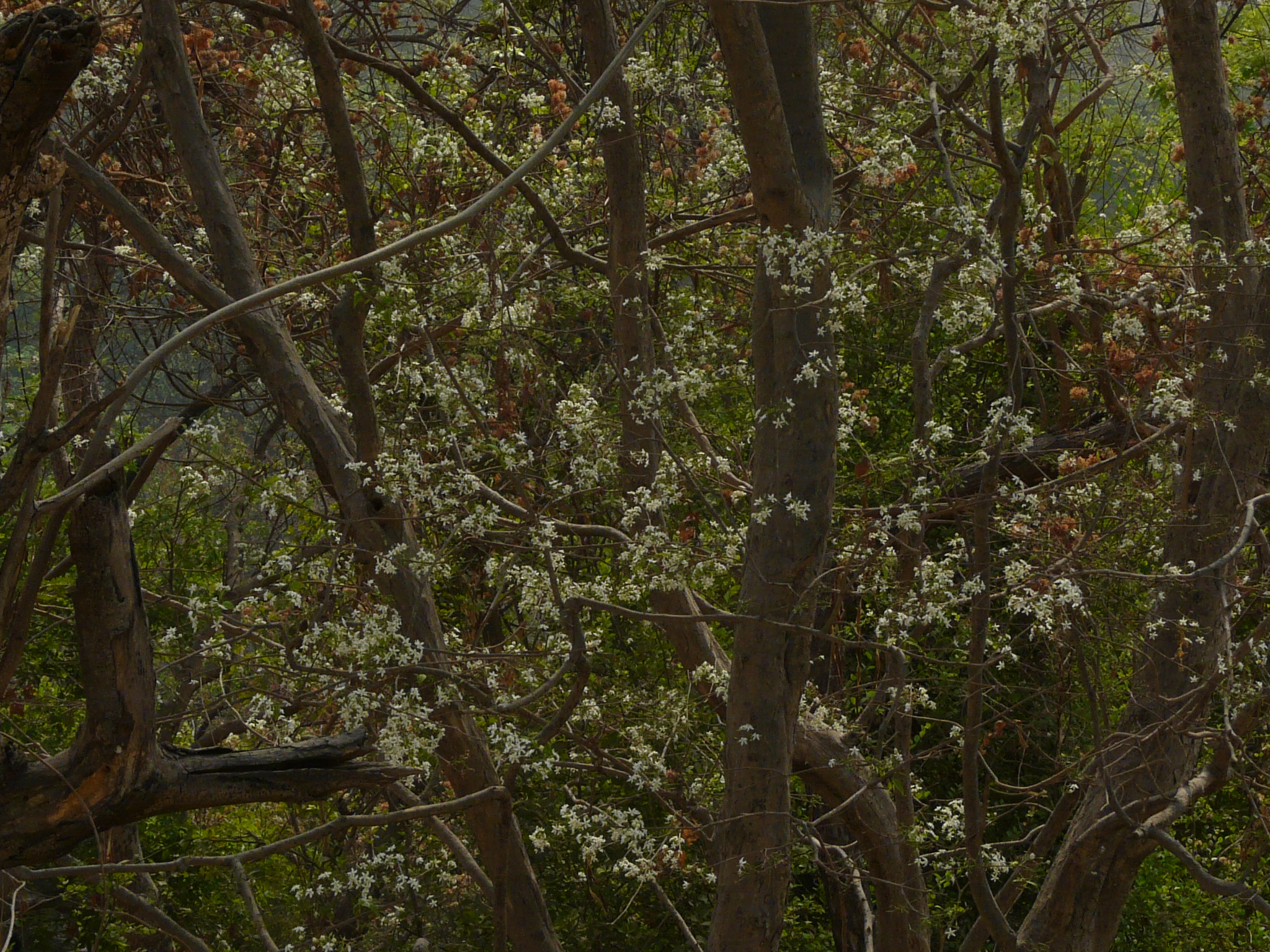 Apocynaceae (dogbane family) » Wrightia tinctoria RITE-ee-a -- named for William Wright, Scottish physician and botanist tink-TOR-ee-uh -- used in dyeing or has a sap which can stain commonly known as: black indrajau, dyeing rosebay, dyers’s oleander, ivory tree, pala indigo plant, sweet indrajao • Gujarati: દૂધલો dudhalo • Hindi: दुधी dudhi, इन्द्रजौ indrajau, काला कुडा kala kuda, करायजा karayaja, कुडा kuda • Kannada: ಅಜಮರ ajamara • Konkani: काळाकुडो kalakudo • Marathi: भूरेवडी bhurevadi, काळा कुडा kala kuda • Malayalam: ഭന്തപ്പാല bhanthappaala, കമ്പിപ്പാല kampippaala, നിലപ്പാല nilappaala • Sanskrit: असित कुटज asita kutaj, hyamaraka, स्त्री कुटज stri kutaja • Tamil: இரும்பாலை irum-palai, பாலை paalai, வெட்பாலை vet-palai • Telugu: అంకుడుచెట్టు ankuduchettu, చిట్టిఅంకుడు chiti-anikudu, కొండజెముడు kondajemudu Native to: India, Myanmar References: Flowers of India • EcoPort • M.M.P.N.D.